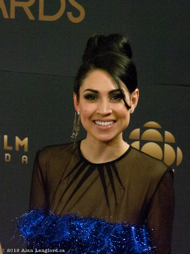 Cassie Steele, Genie Awards 2012